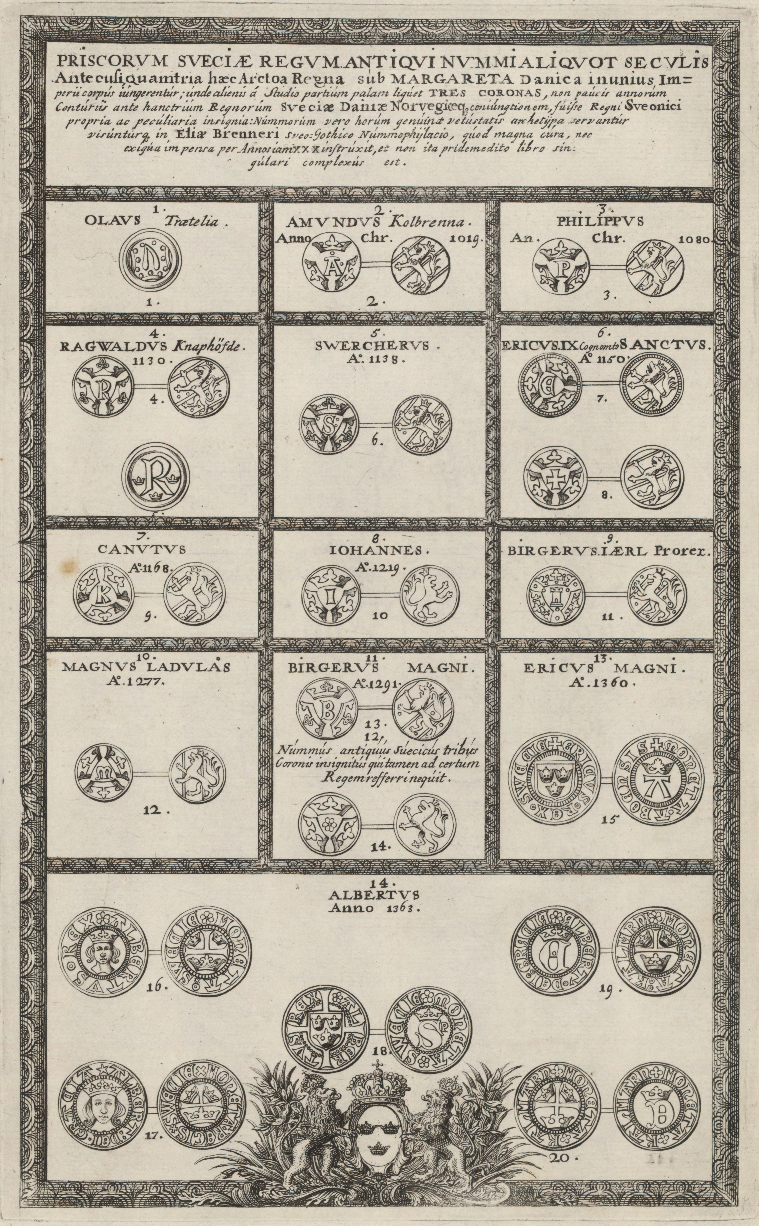 Priscorum Sveciae regum antiqvi nummi aliquot seculis ante cufi, quam tria haec Arctoa Regna sub Margareta danica in unius imperii corpus jungerentur : [Bild] / [Willem Swidde]